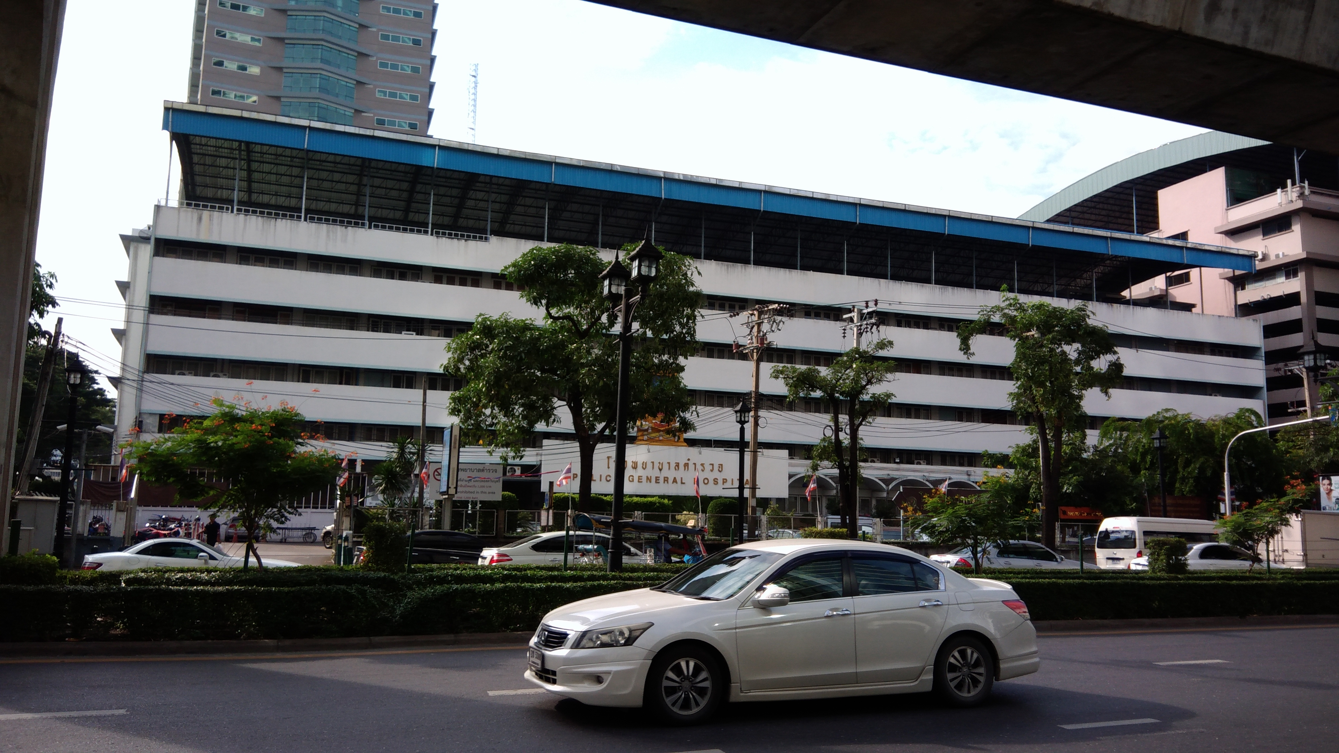 中文（台灣）: Police General Hospital in Bangkok